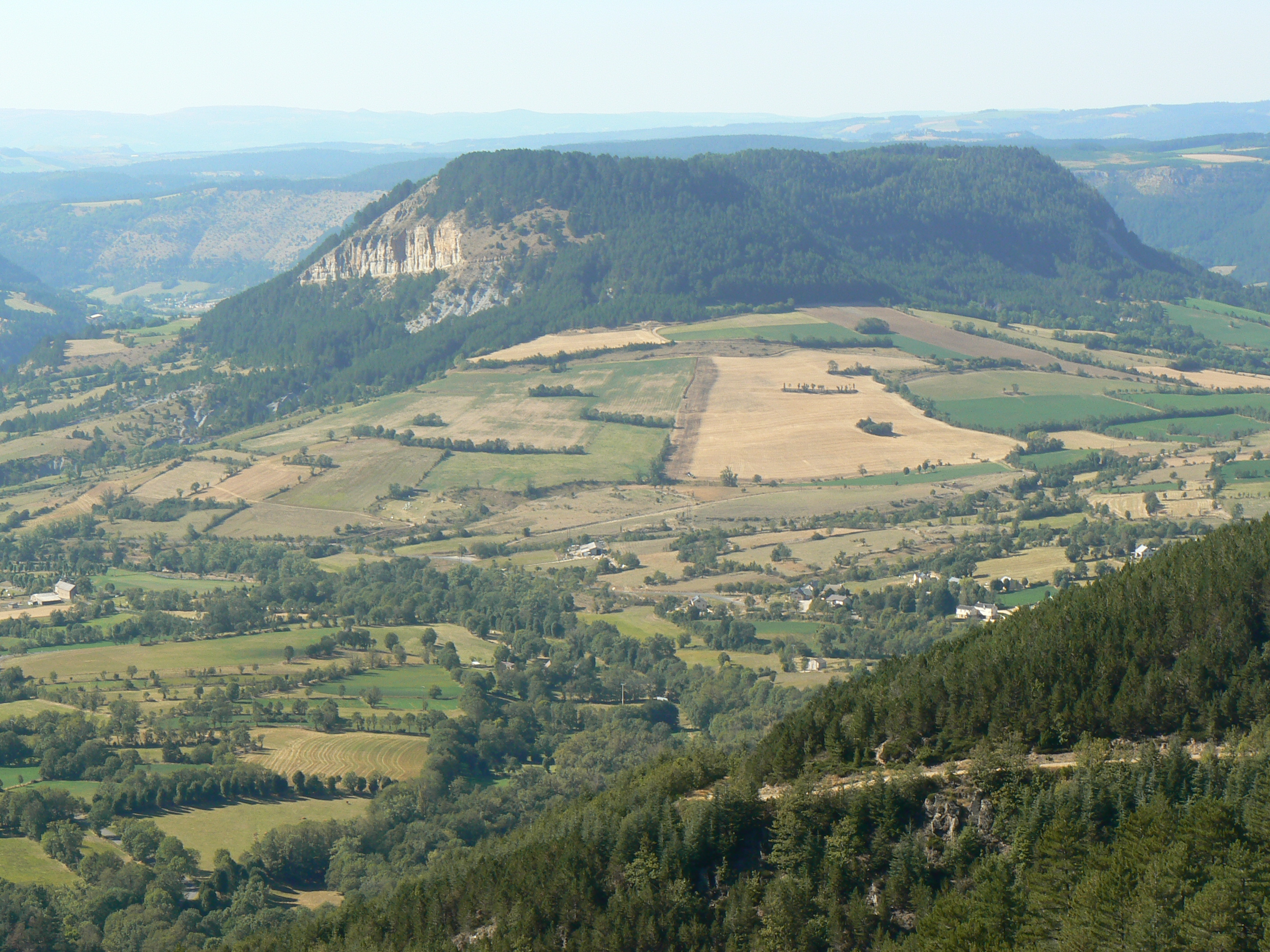 Le truc de Balduc vu depuis le causse de Mende (mont Mimat) en Lozère (France)